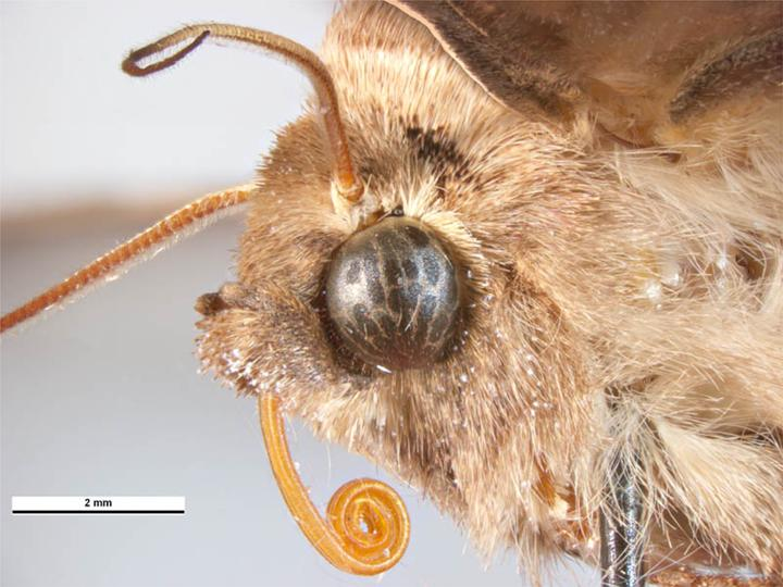 Mythimna unipuncta male, head